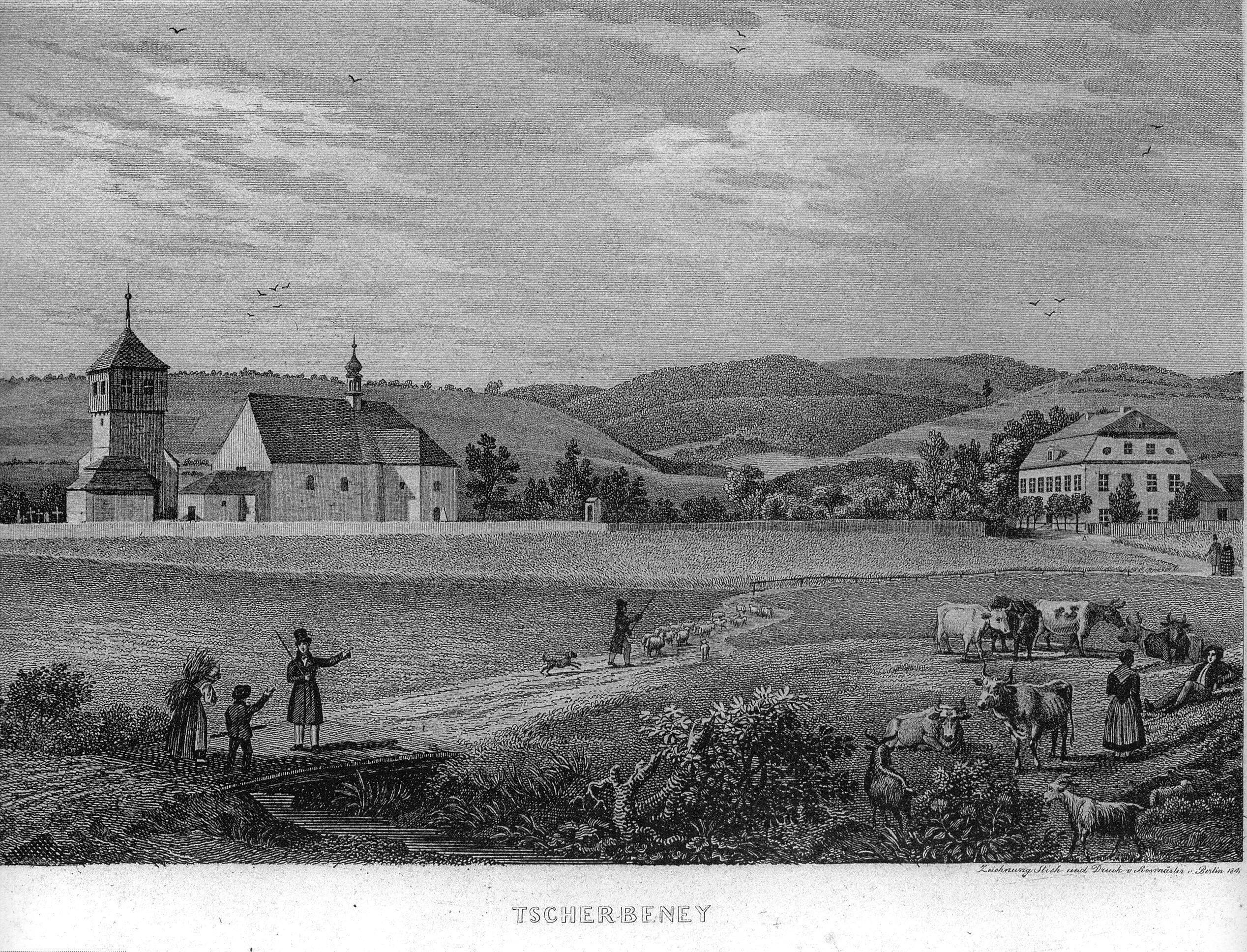 Tscherbeney: Kirche und Pfarrhaus (Stich von Rossmäsler)